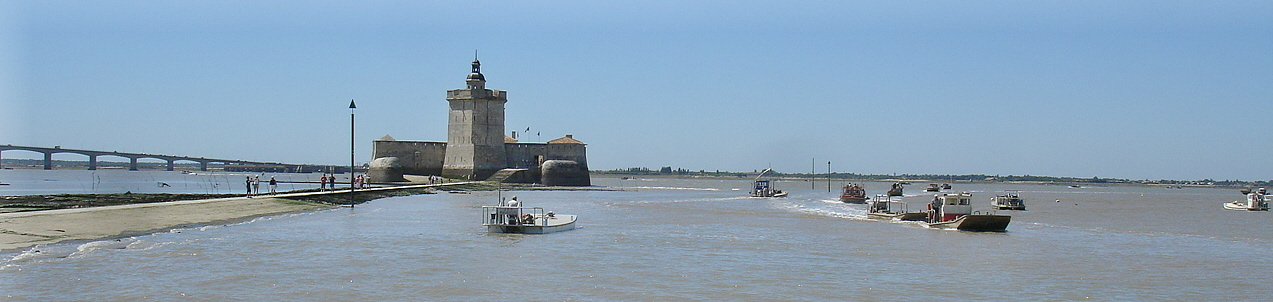 Chalands de retour de la marée devant le fort Louvois 17560 Bourcefranc le Chapus